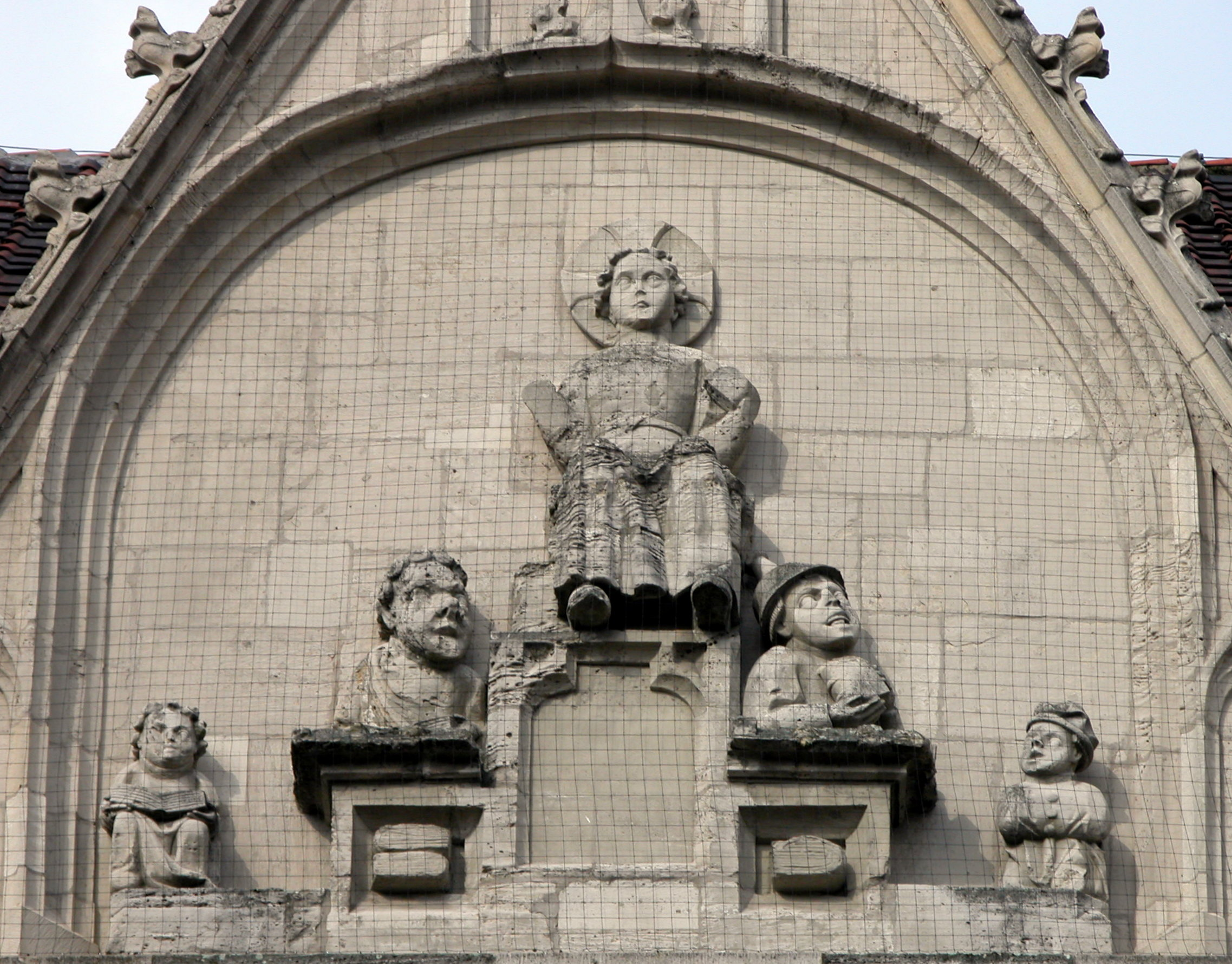 Braunschweig: Giebel auf der Südseite der Andreaskirche, der Krüppel darstellen soll, von der Kröppelstraße gesehen.